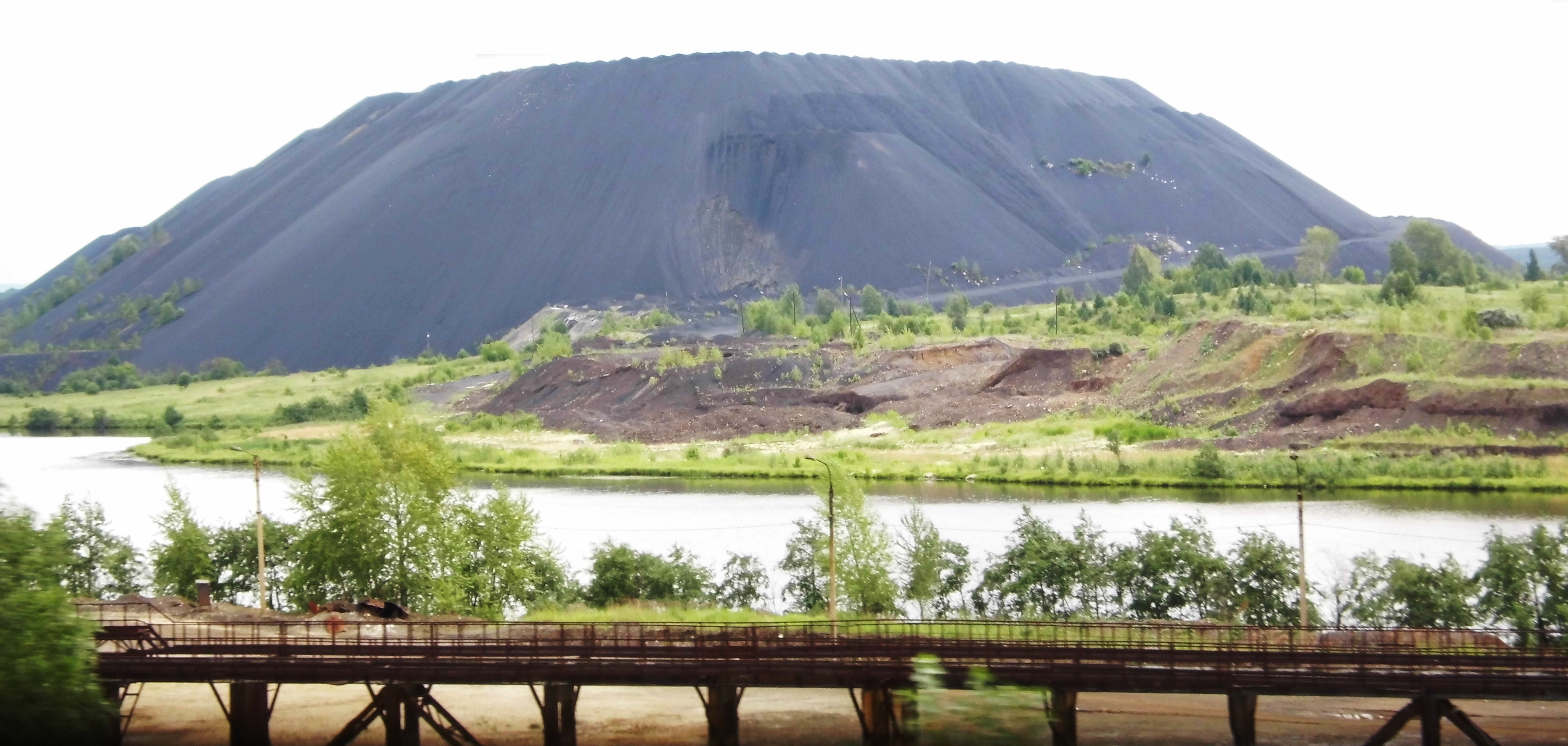 Пруд ("Генеральское водохранилище") на реке Генералка (левый приток реки Уфалейка) в городе Верхний Уфалей. На заднем плане - отвалы шахтно-печного шлака комбината "Уфалейникель".